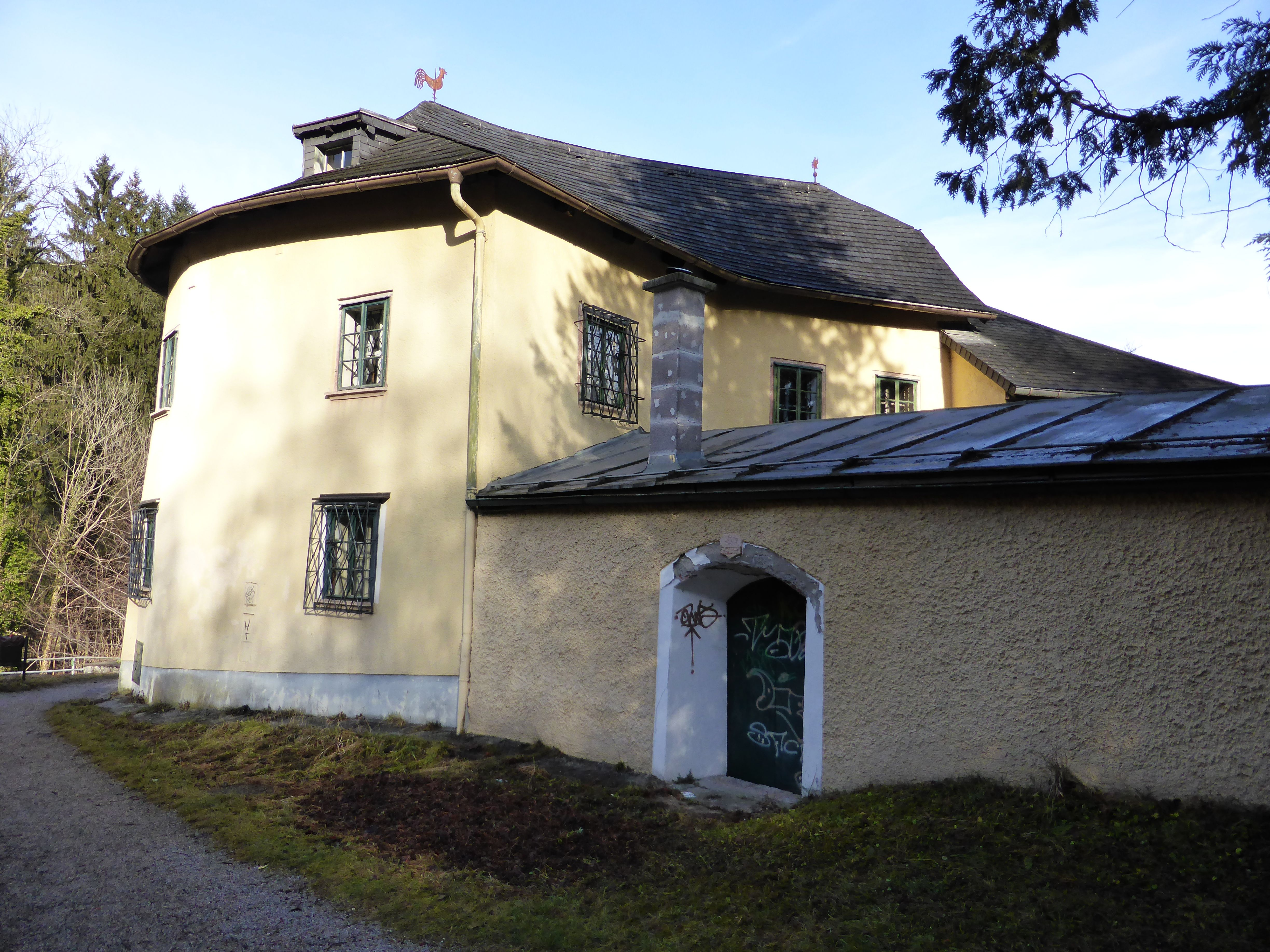 Benedikt-Stöckl und Kapelle